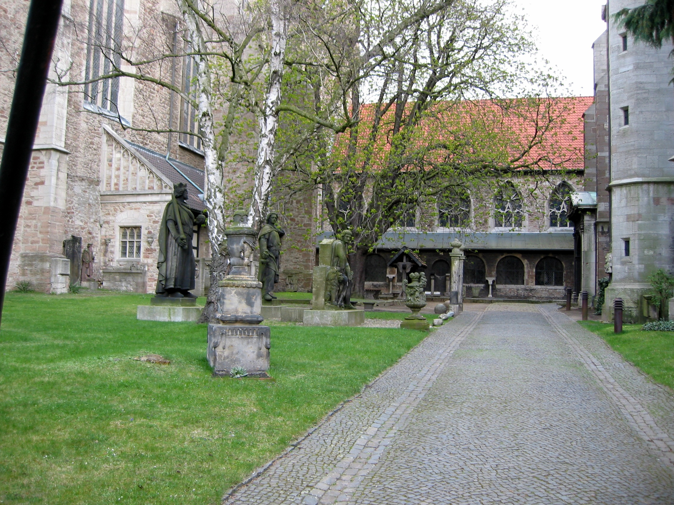 Braunschweig, Museum an der Aegidienkirche